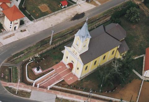 Nyirlugos Hungary aerialphotography. Szent Erzsébet templom